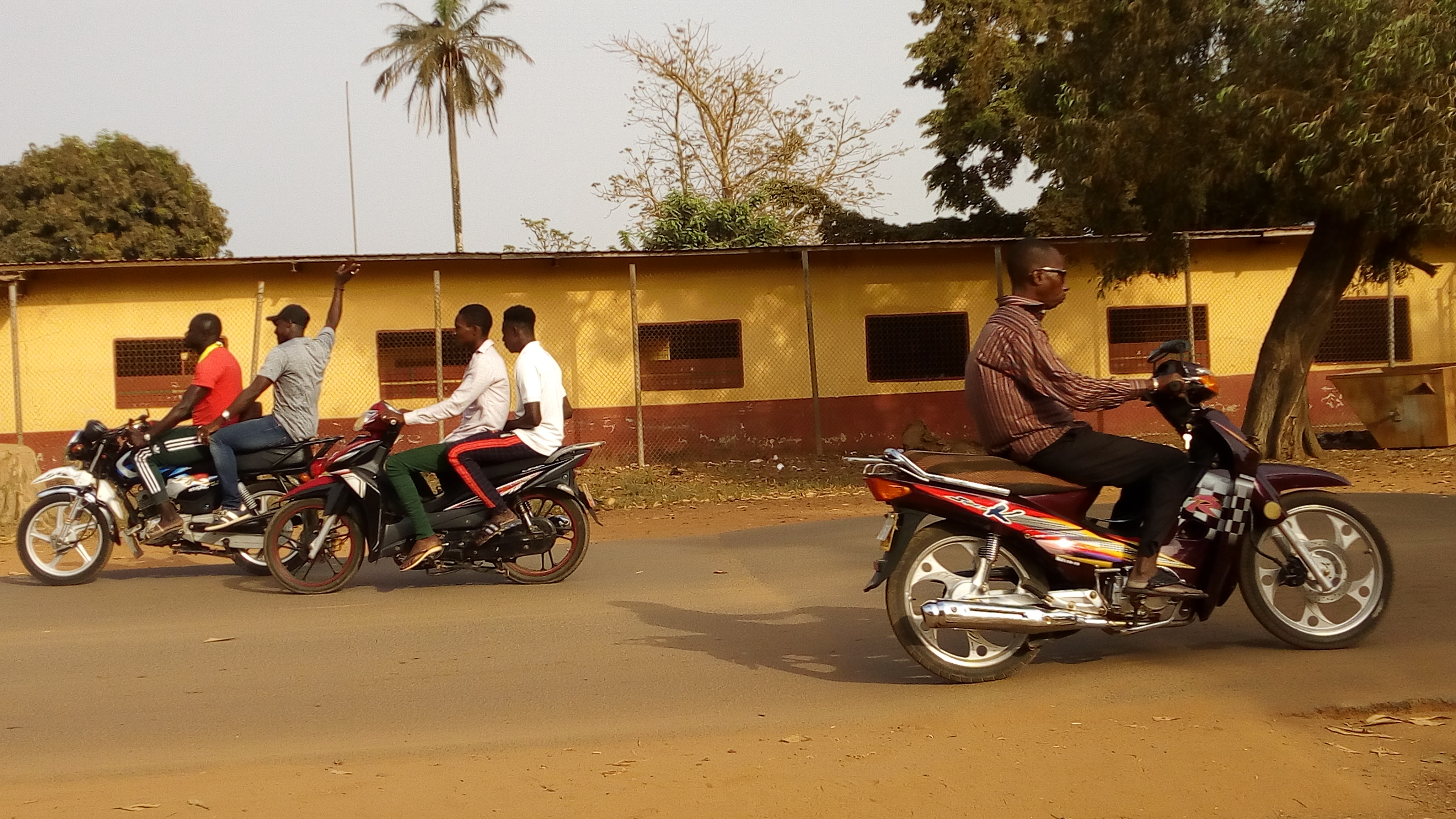 Motard sur la route de kamsar cité près de école élémentaire de N'Dama This is an image with the theme "Africa on the Move or Transport" from: Guinea